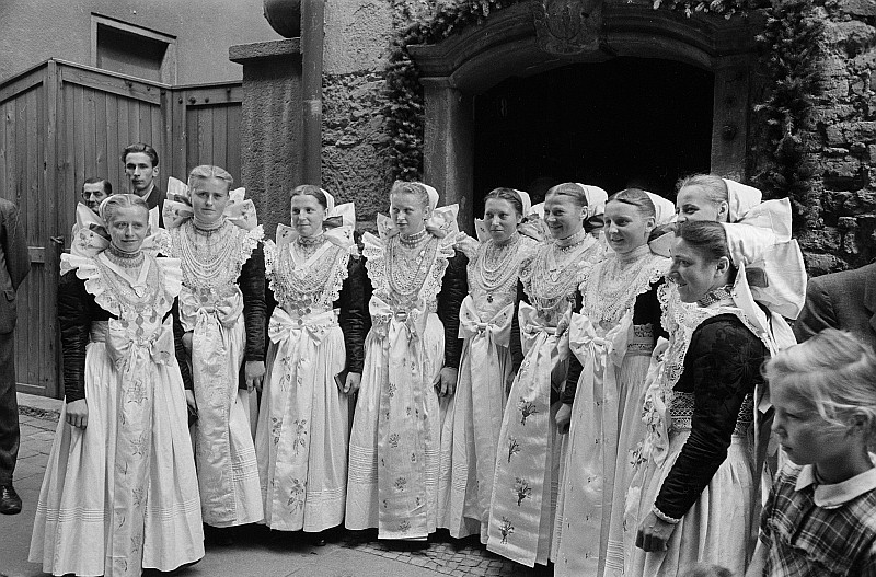 Original image description from the Deutsche Fotothek Sorbinnen